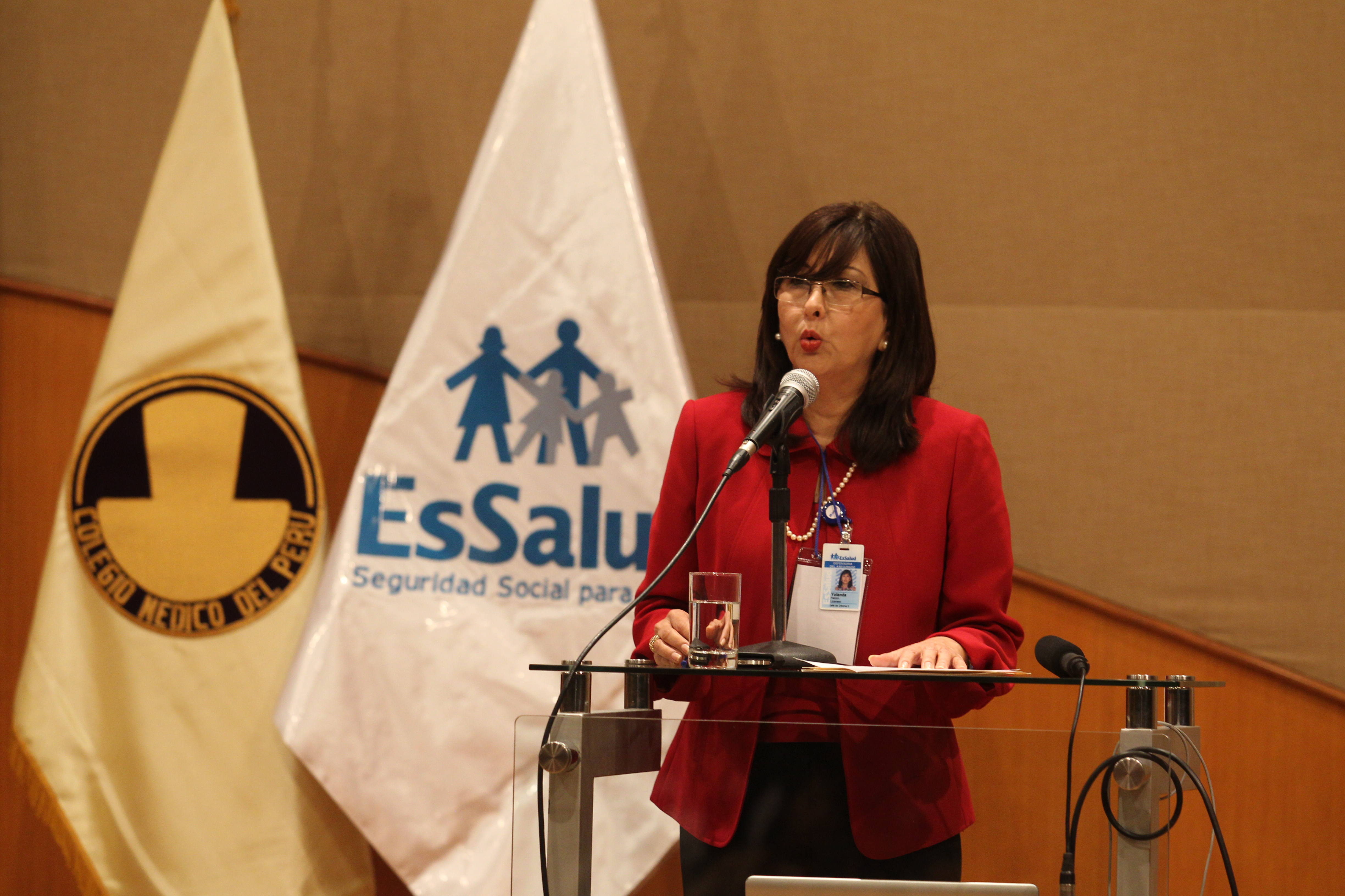 Yolanda Falcón Lizaraso en conferencia en el Colegio Médico del Perú